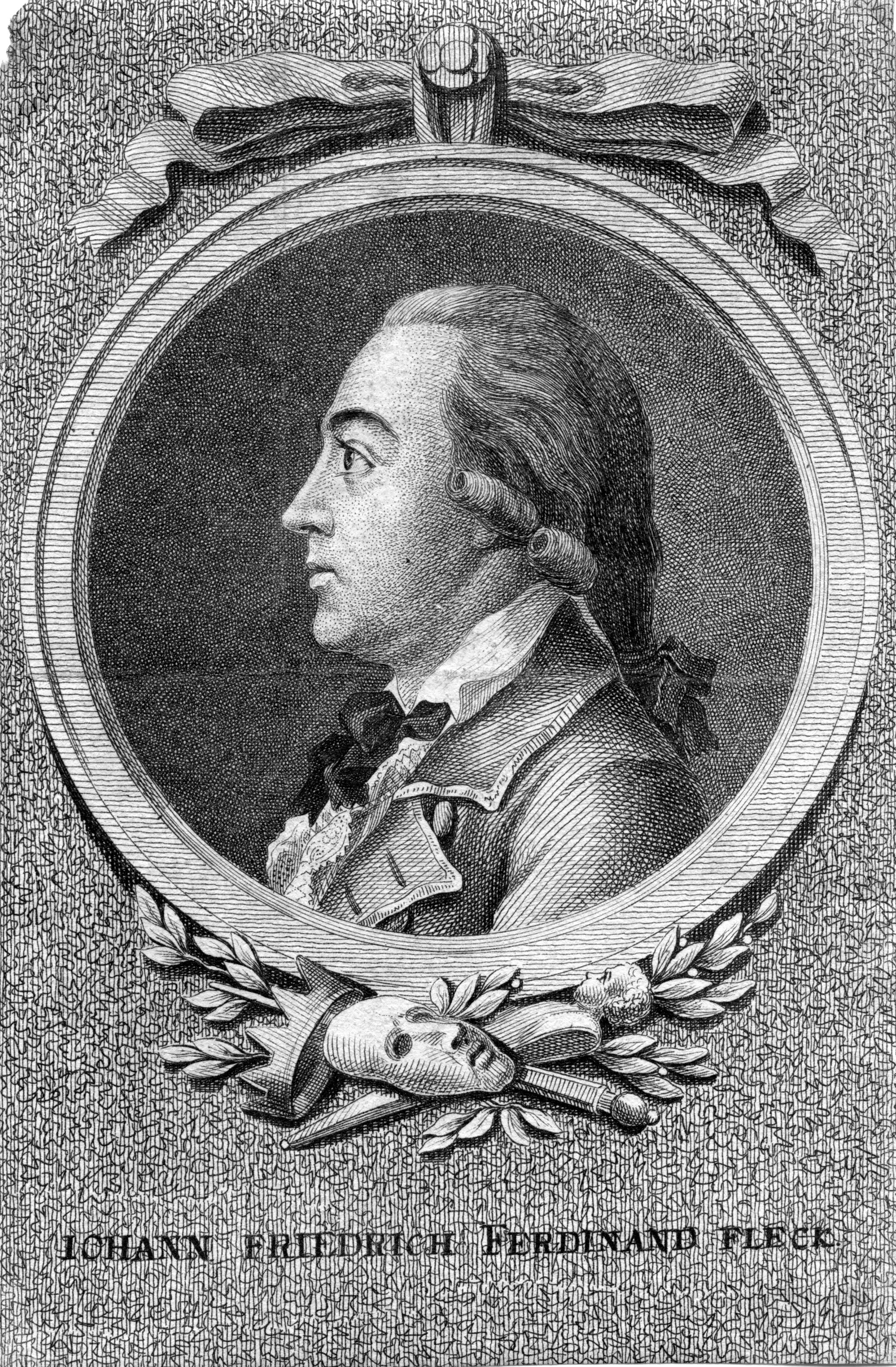 portrait gravé